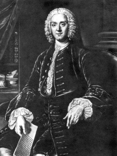 George Grenville Public Domain